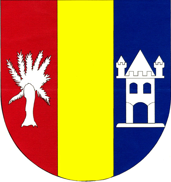 Znak obce Telnice v okrese Brno-venkov